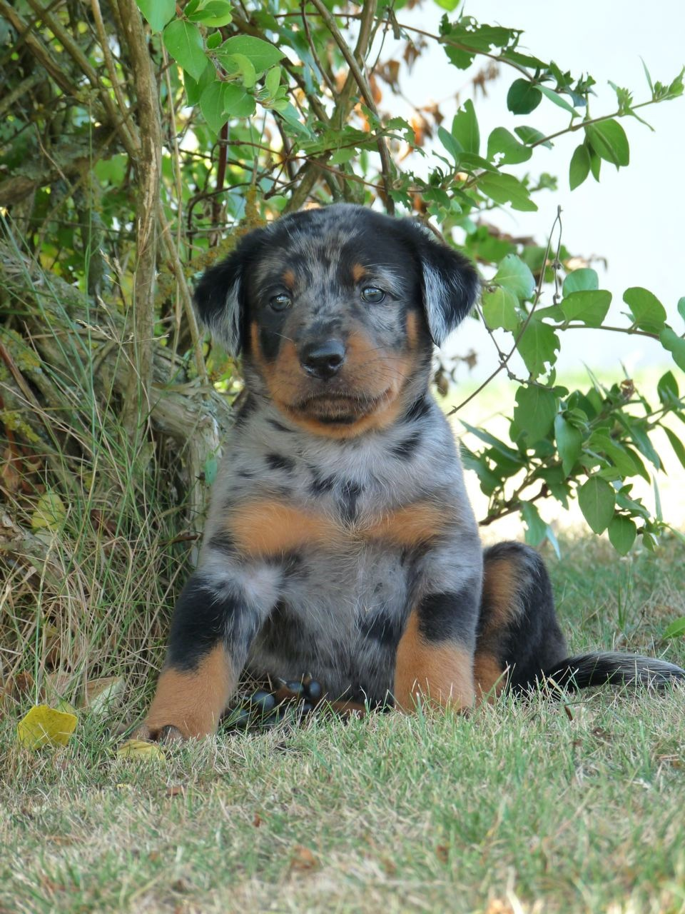 Bas Rouge/Beauceron